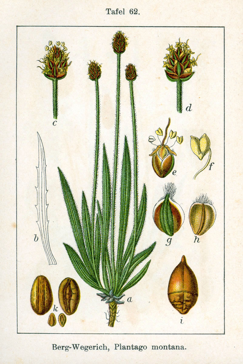 Plantago atrata Hoppe subsp. atrata, syn. Plantago montana Lam. non Huds. 1762, nom. illeg. Original Description Berg-Wegerich, Plantago montana